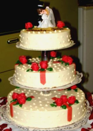 Description Bruidstaart Date30 September 2006SourceOwn workAuthornl:Gebruiker:ObarskyrPermission (Reusing this file) Geeft toestemming onder opgegeven licentie Bruidstaart